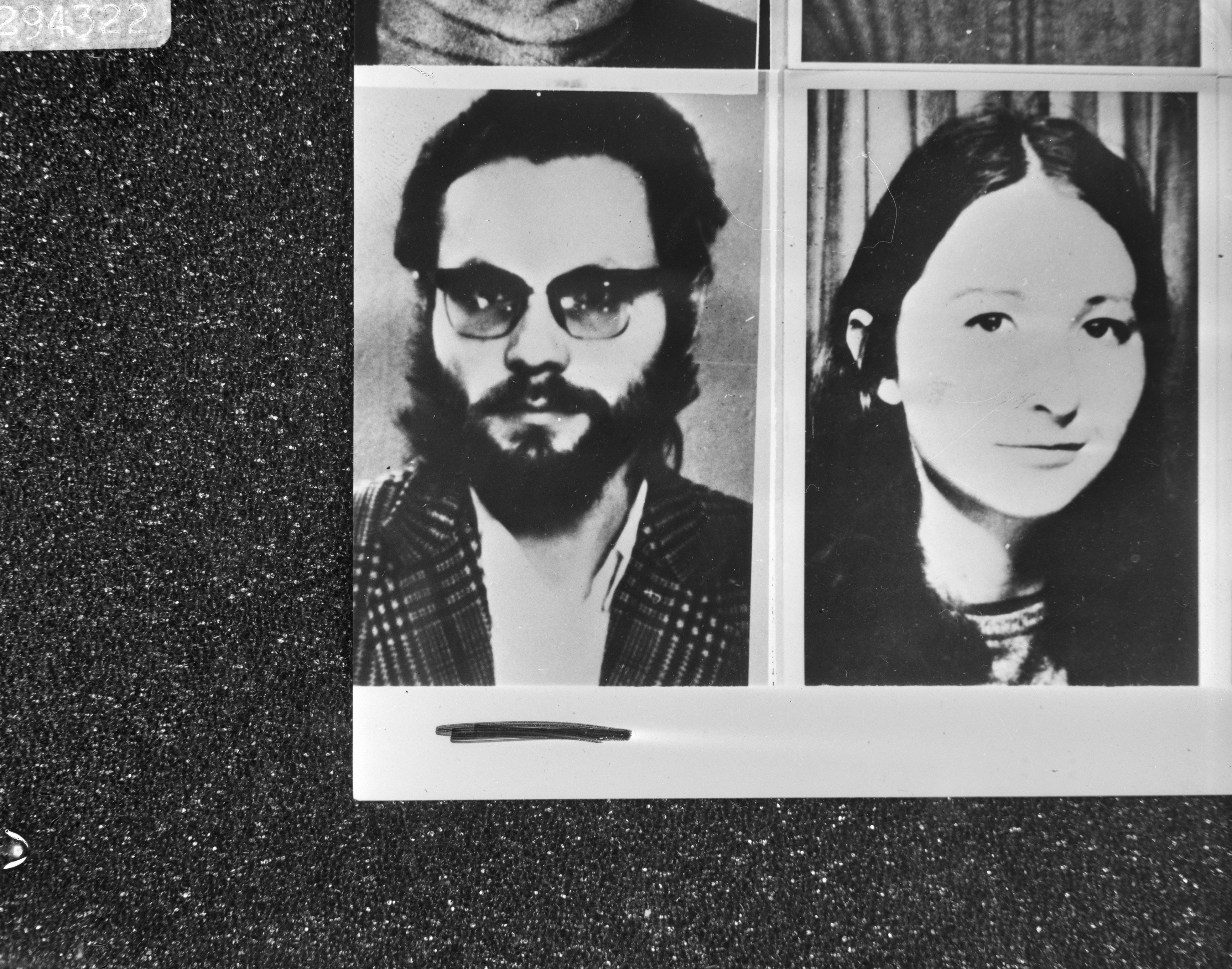 Collectie / Archief : Fotocollectie Anefo Reportage / Serie : [ onbekend ] Beschrijving : Rolf Clemens Wagner & Friederike Krabbe (Rote Armee Fraktion) Datum : 11 november 1977 Instellingsnaam : RAF Fotograaf : Fotograaf Onbekend / Anefo Auteursrechthebbende : Nationaal Archief Materiaalsoort : Negatief (zwart/wit) Nummer archiefinventaris : bekijk toegang 2.24.01.04 Bestanddeelnummer : 929-4322